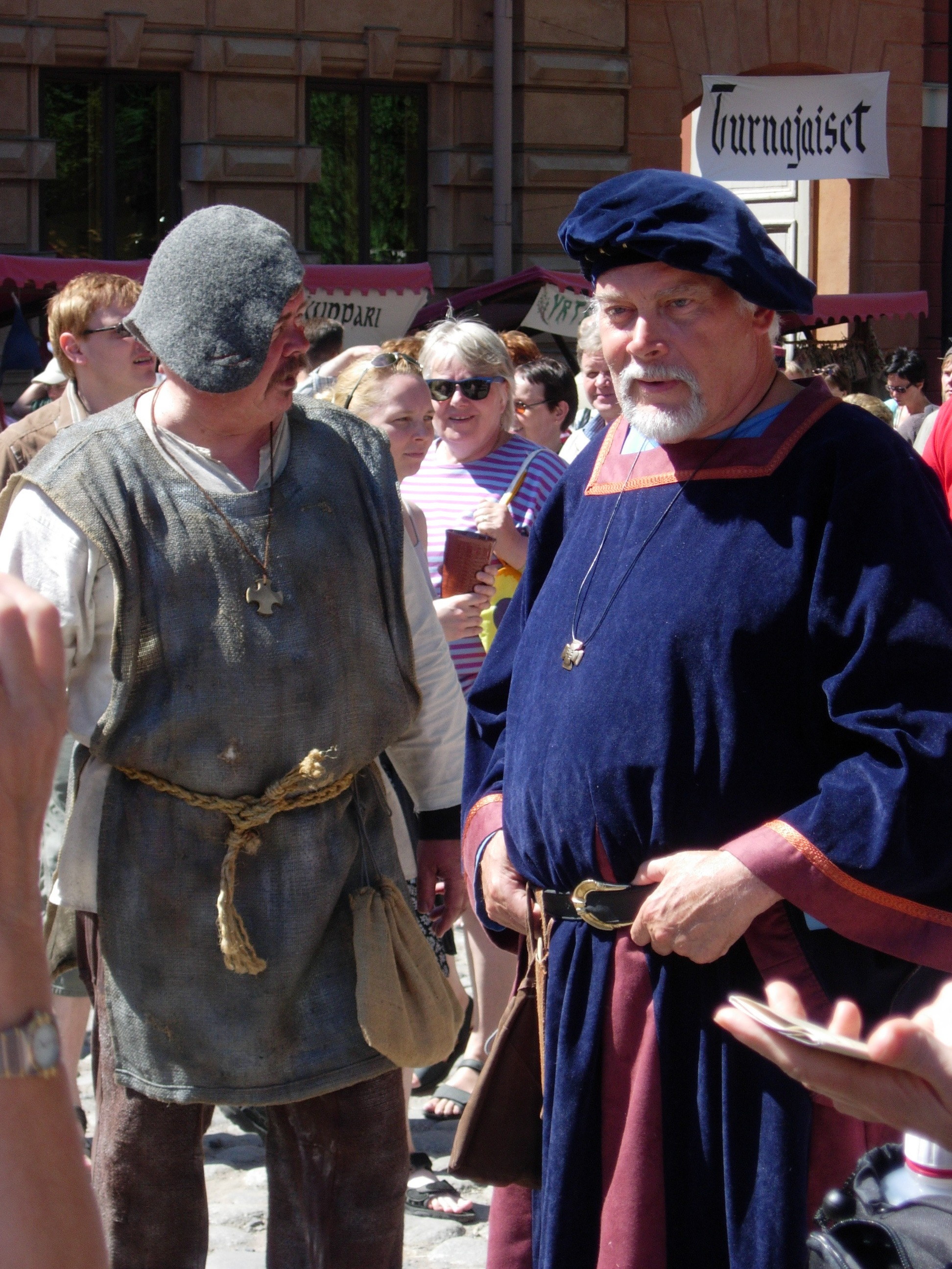 Turku Medieval Market 2005.